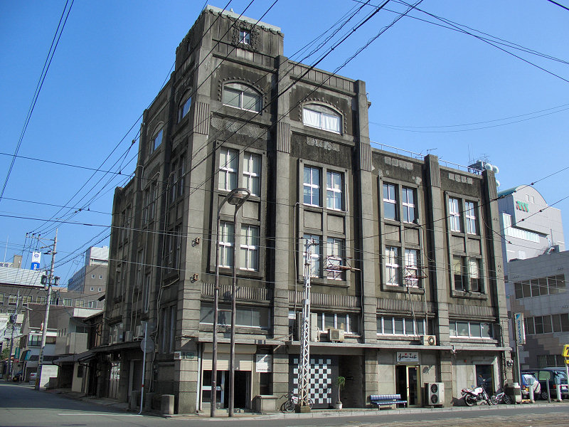 早野ビル 国の登録有形文化財 1922年築 設計者 : 矢上信次 撮影者/著作者/著作権保有者 : MK Products (本人がアップロード 撮影日 : 2005/10/18 慶徳校前停留場用にアップロードした画像です。良い画像があれば別の画像に変えてください。